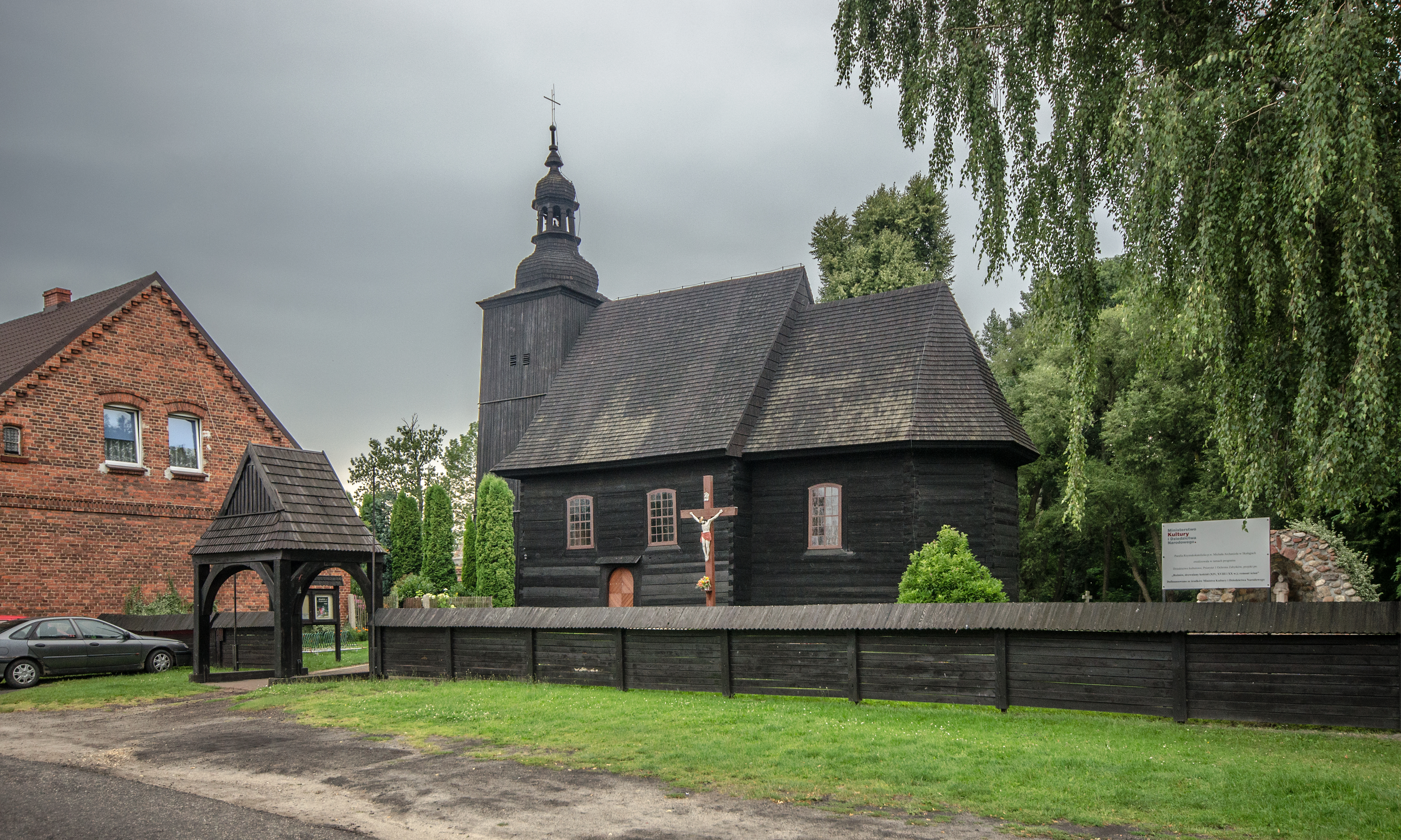 Rożnów, kościół ewang. p.w. Św. Trójcy, ob. rzym.-kat. fil. p.w. śś. Piotra i Pawła, 1788